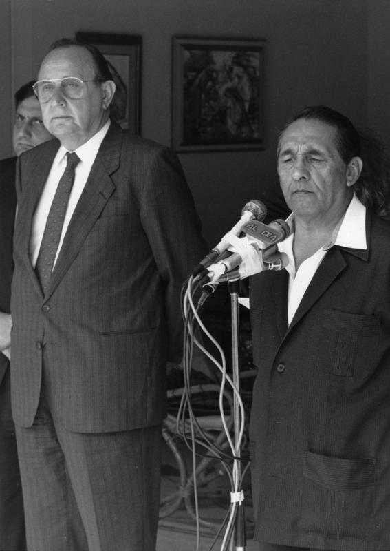 San Salvador, 13. April 1987 Am 7. April 1987 startete der Bundesminister des Auswärtigen, Hans-Dietrich Genscher, zu einer Reise nach Mittelamerika. Vom 7. bis 9.4. besuchte er Venezuela und vom 9. bis 13.4. die Republik Costa Rica. Letzte Station seiner Reise war El Salvador. Am 14. April kehrte Bundesaußenminister Genscher nach Bonn zurück. Bundesaußenminister Genscher (li.) mit dem Präsidenten der Republik El Salvador, Jose Napoleon Duarte, während einer Pressekonferenz.